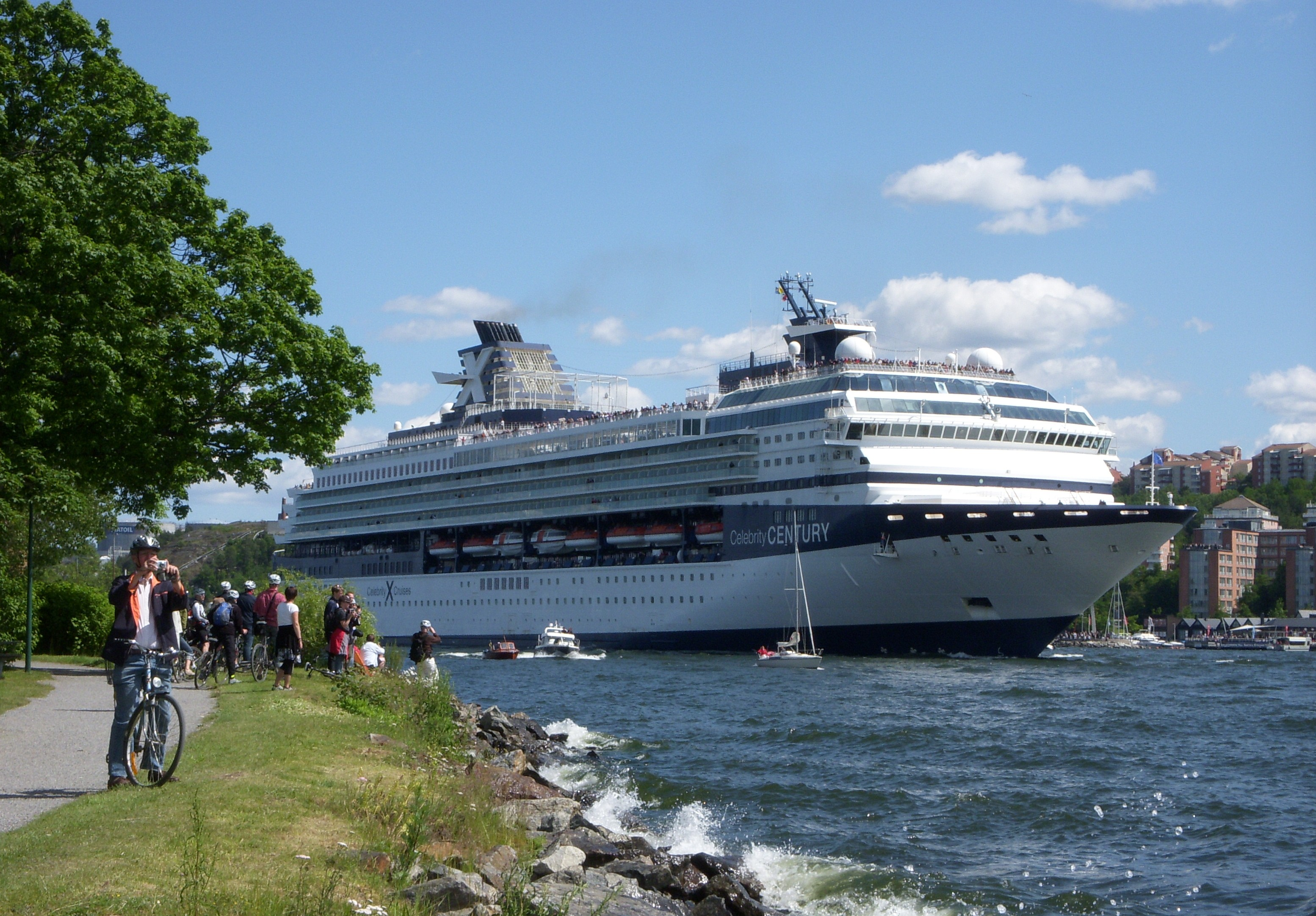 M/S Century på Saltsjön i Stockholm, juni 2009